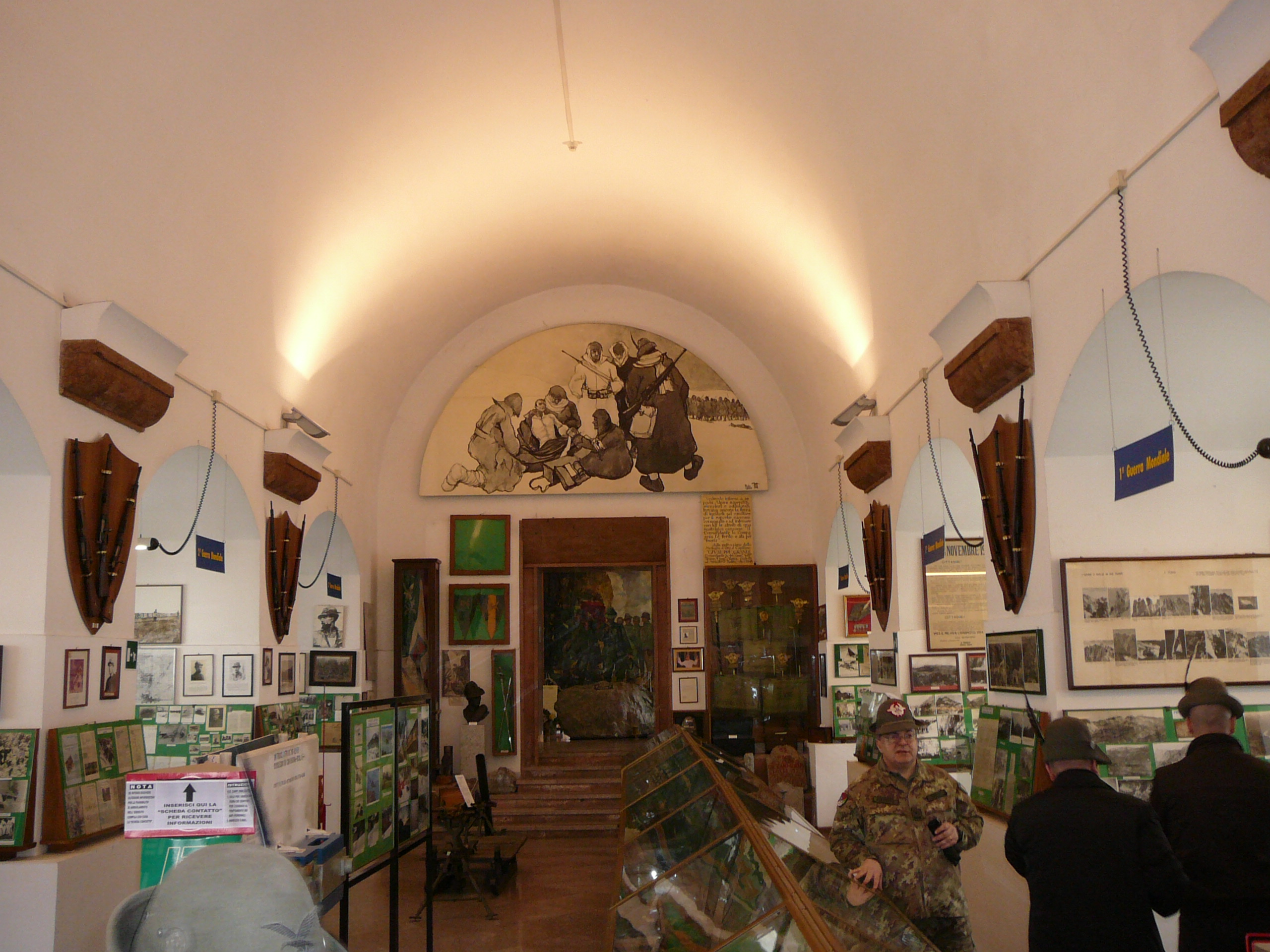 Interno museo storico degli Alpini. La guida e' il gen. Basset